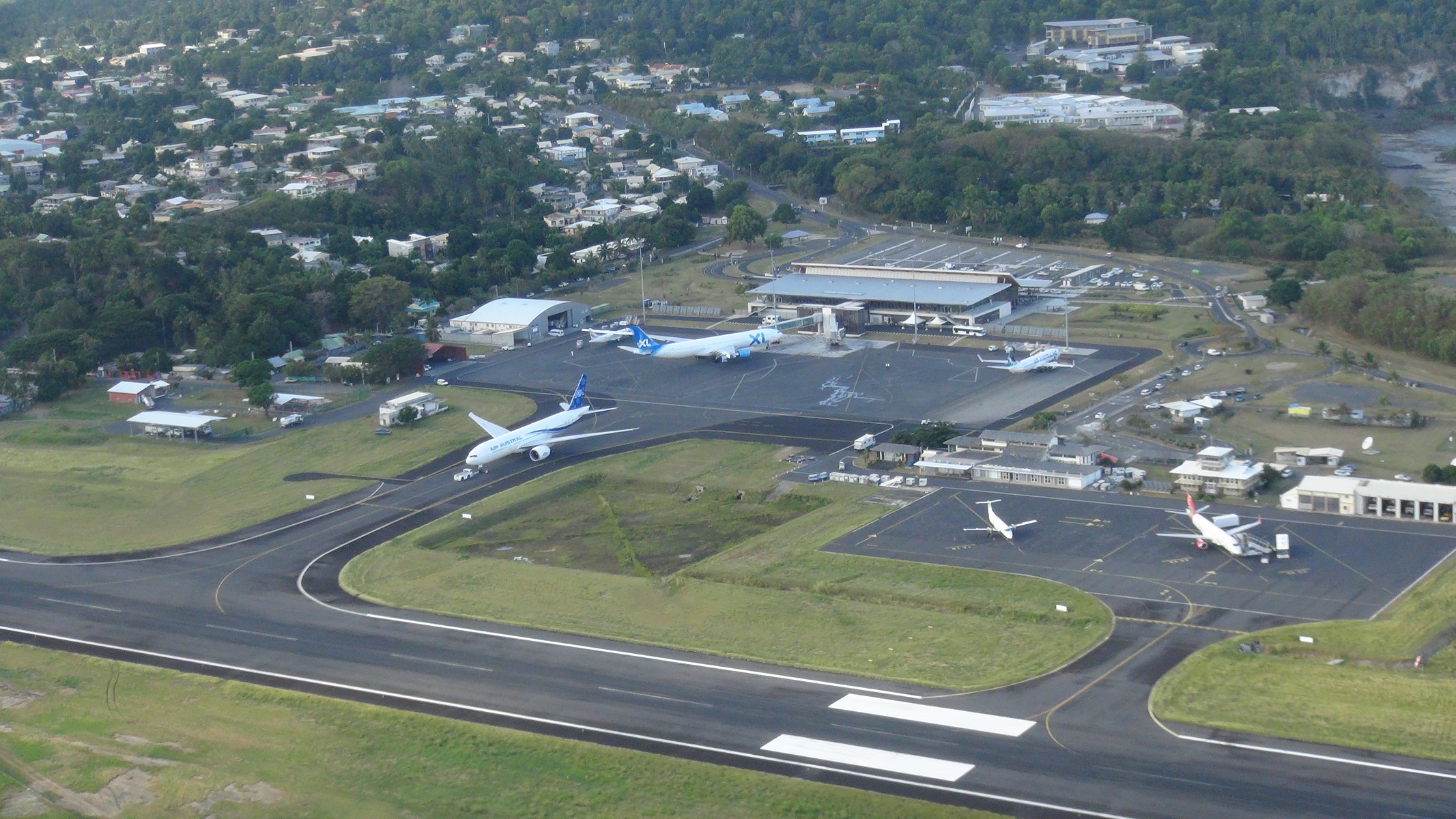 Appareils transitant sur l'aéroport. Boeing 777-200LR de chez air austral. A330-200 de chez XL-Airways